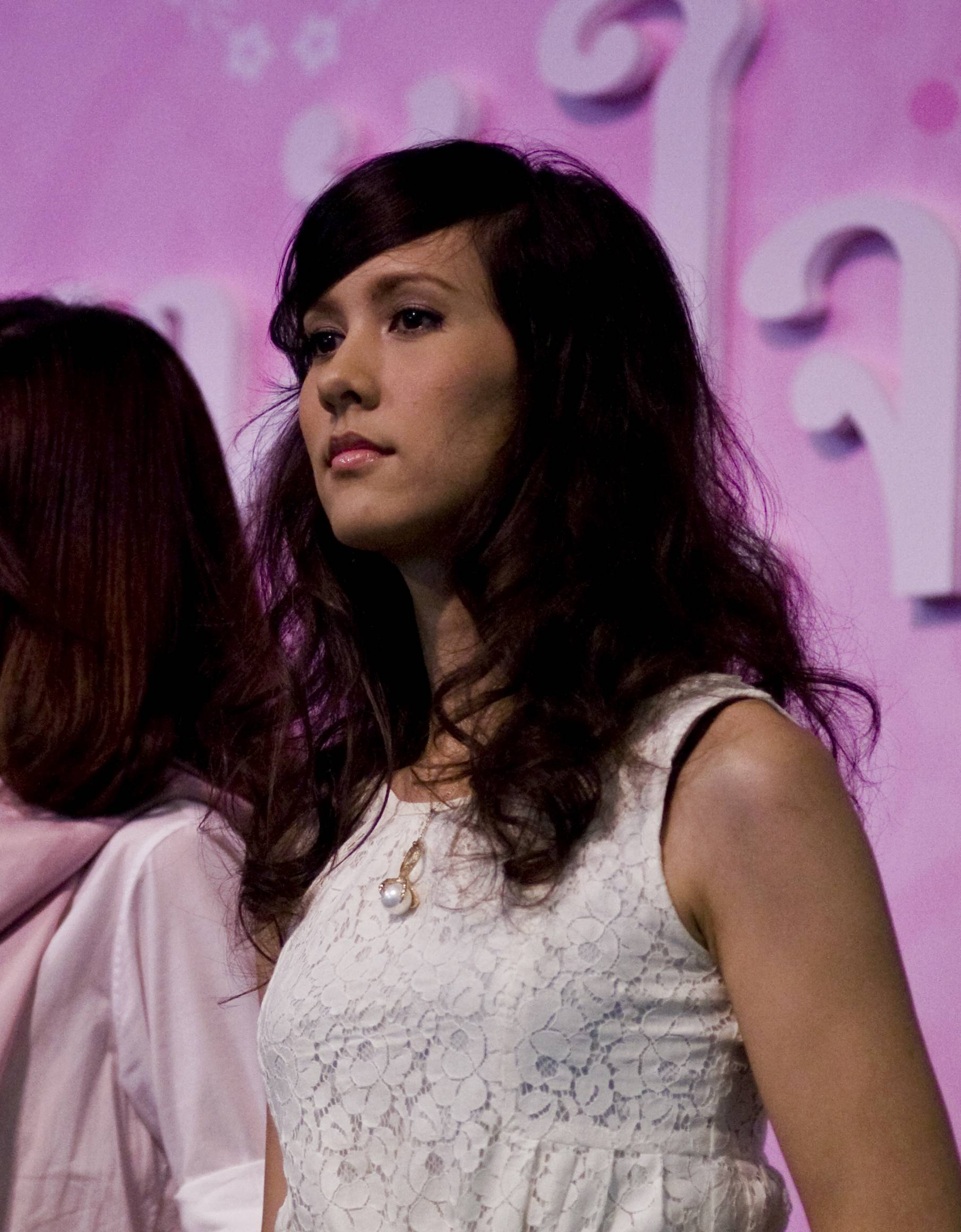 ญารินดา บุนนาค / นายกรัฐมนตรี เป็นประธานในงานเปิดโครงการคนไทยหัวใจภักดี ณ แฟชั่นฮอลล์ ชั้น 1 ศูนย์การค้าสยามพารากอน กรุงเทพฯ 30ตุลาคม2552 (The Official Site of The Prime Minister of Thailand Photo by พีรพัฒน์ วิมลรังครัตน์)